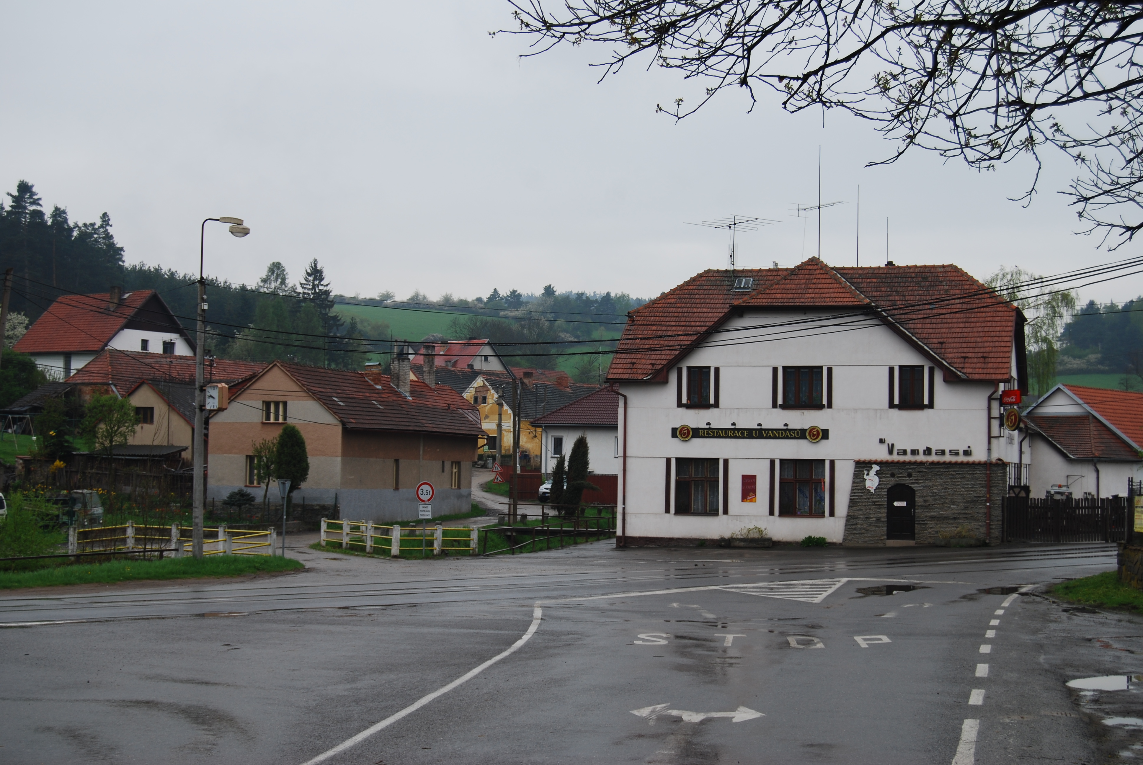 Pohled na část vesnice. Obec Obory v okrese Příbram, kraj Středočeský. Česká republika.